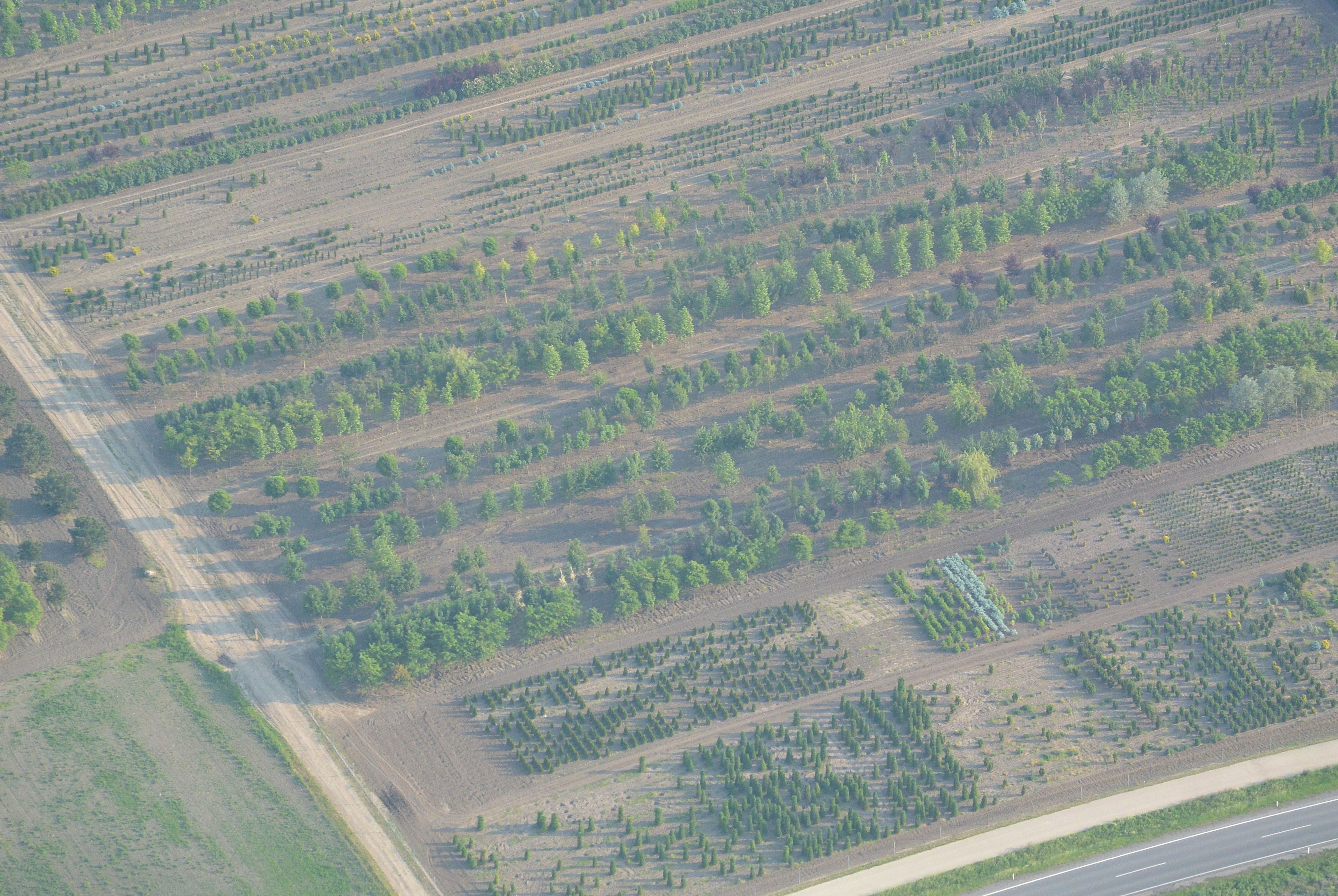 Baumschule Anton Starkl GesmbH in Frauenhofen/Tulln